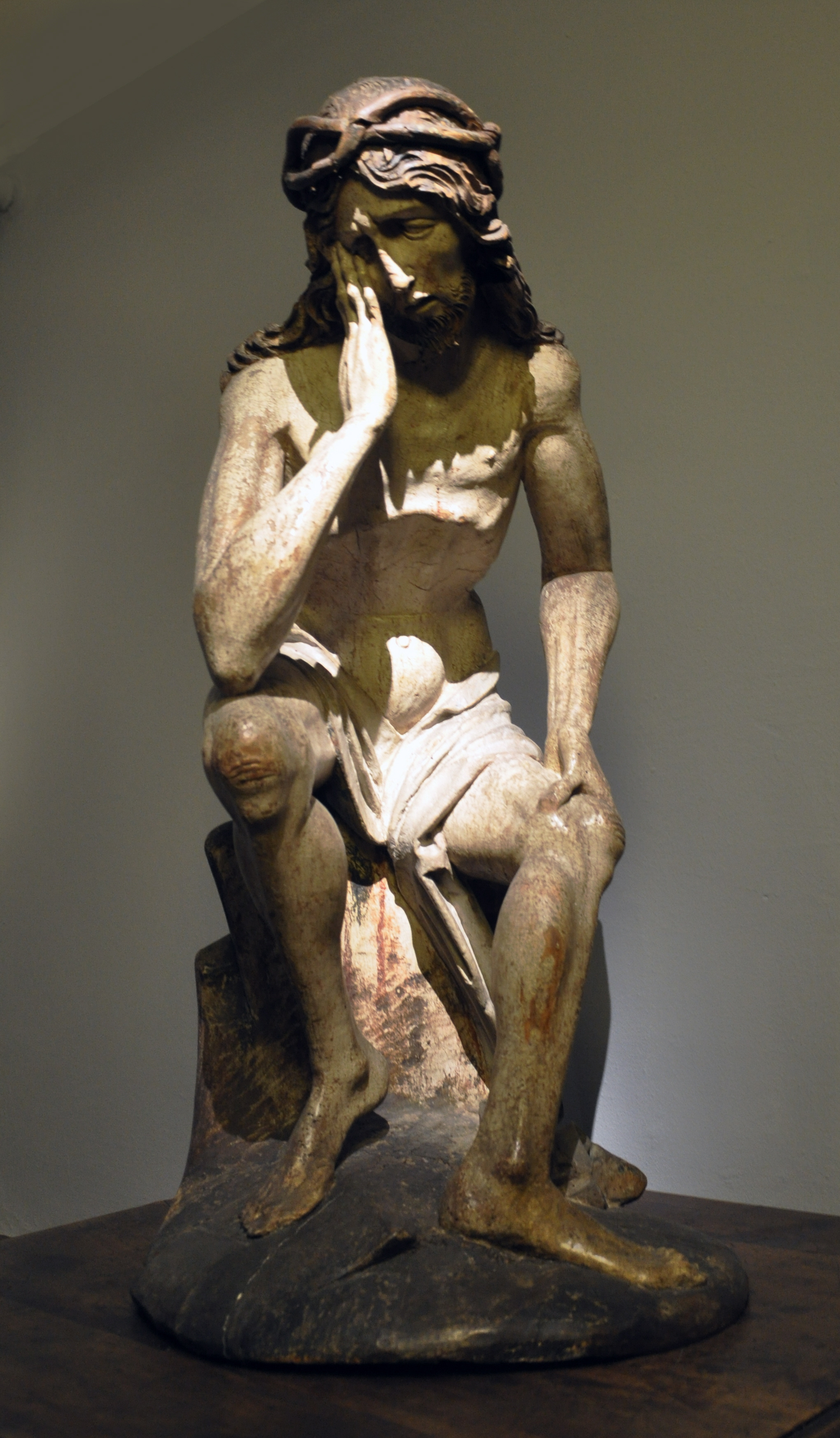 Christus in der Rast; Thüringen oder Sachsen (?), um 1500; Lindenholz (?), Reste alter Farbfassung Liebieghaus, Frankfurt am Main, Leihgabe aus Privatbesitz